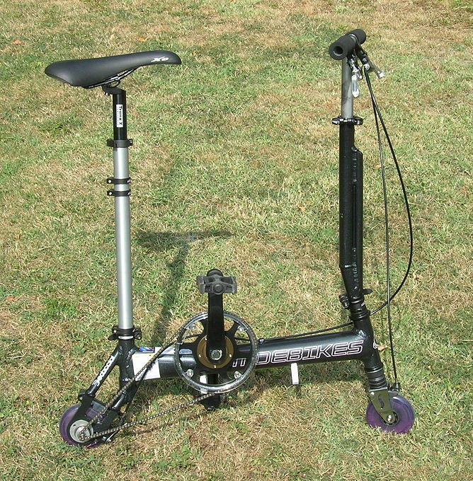 Mini125 2007MY first bike for K Mitsumoto